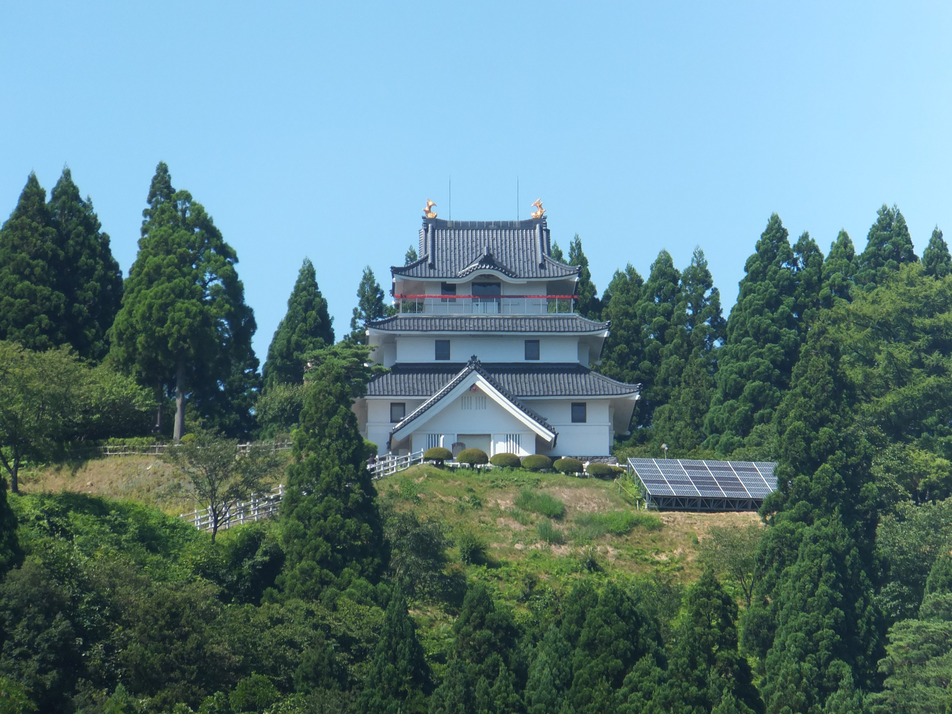 五城目町森林資料館。かつての五城目城址近くに建設された町立の資料館である。